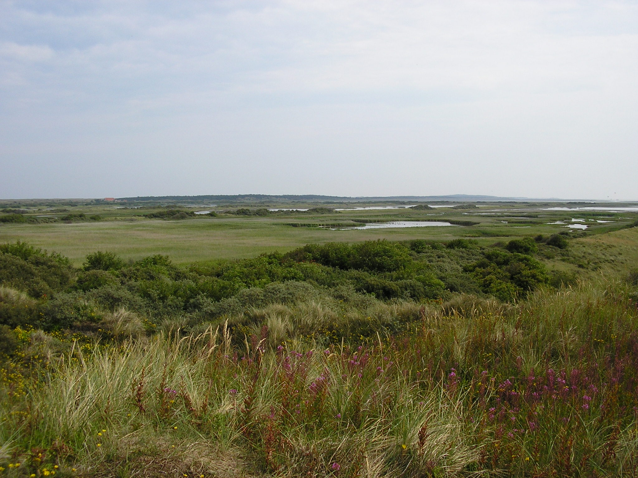 8899 Vlieland, Netherlands